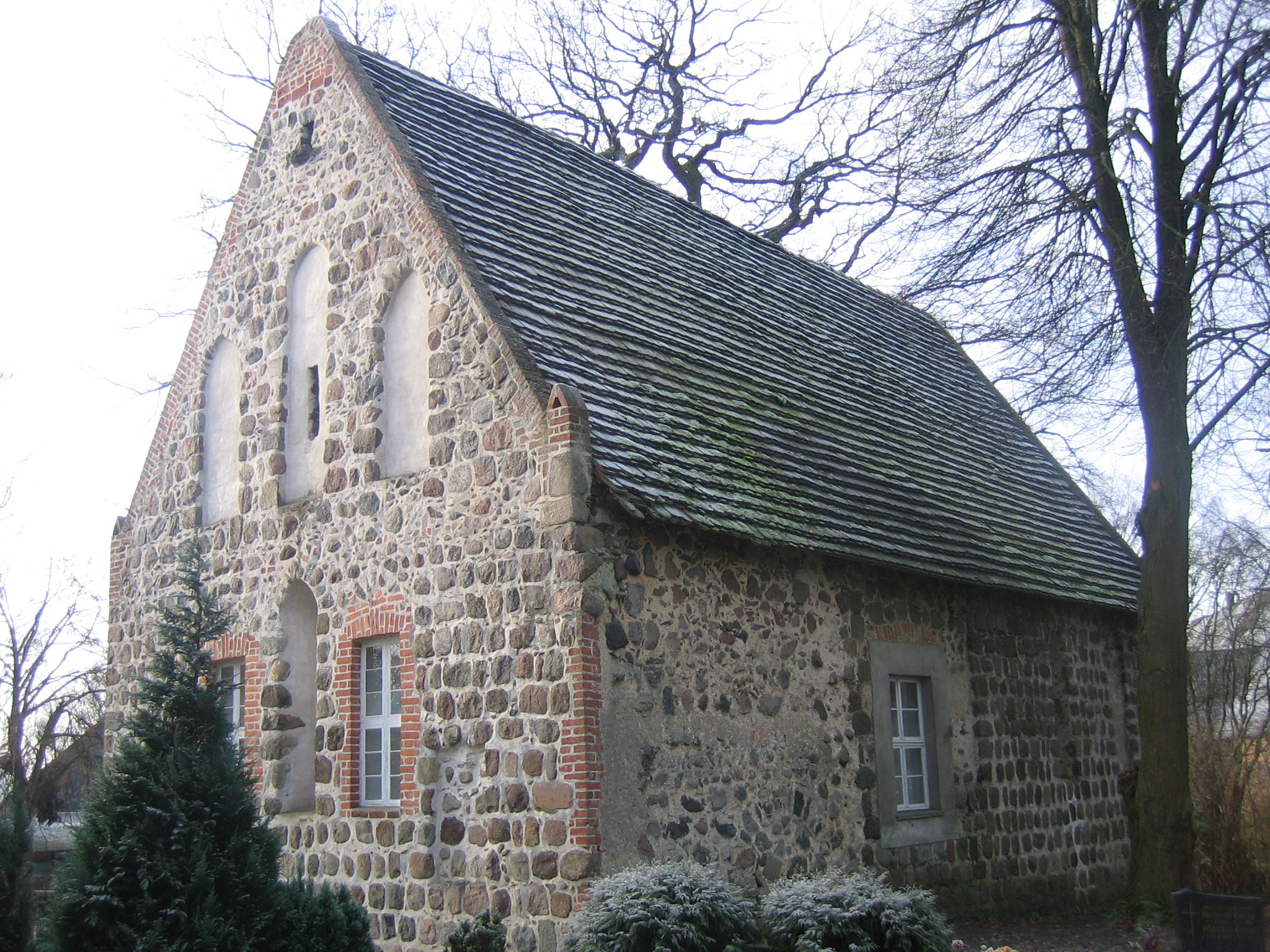 Dorfkirche Loitz, Ortsteil von Burg Stargard, Landkreis Mecklenburgische Seenplatte